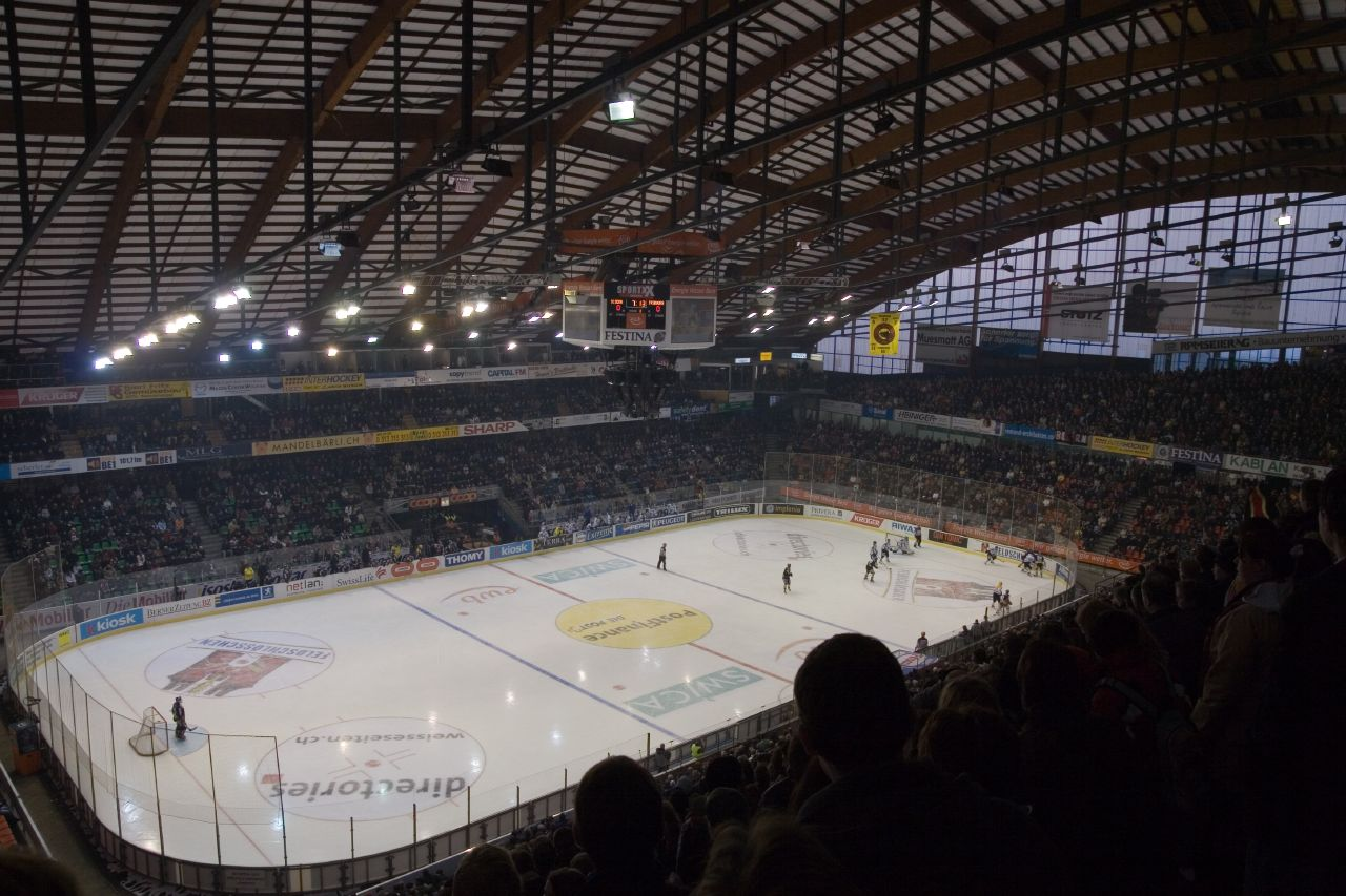 Bern Arena (Stadion des SC Bern)